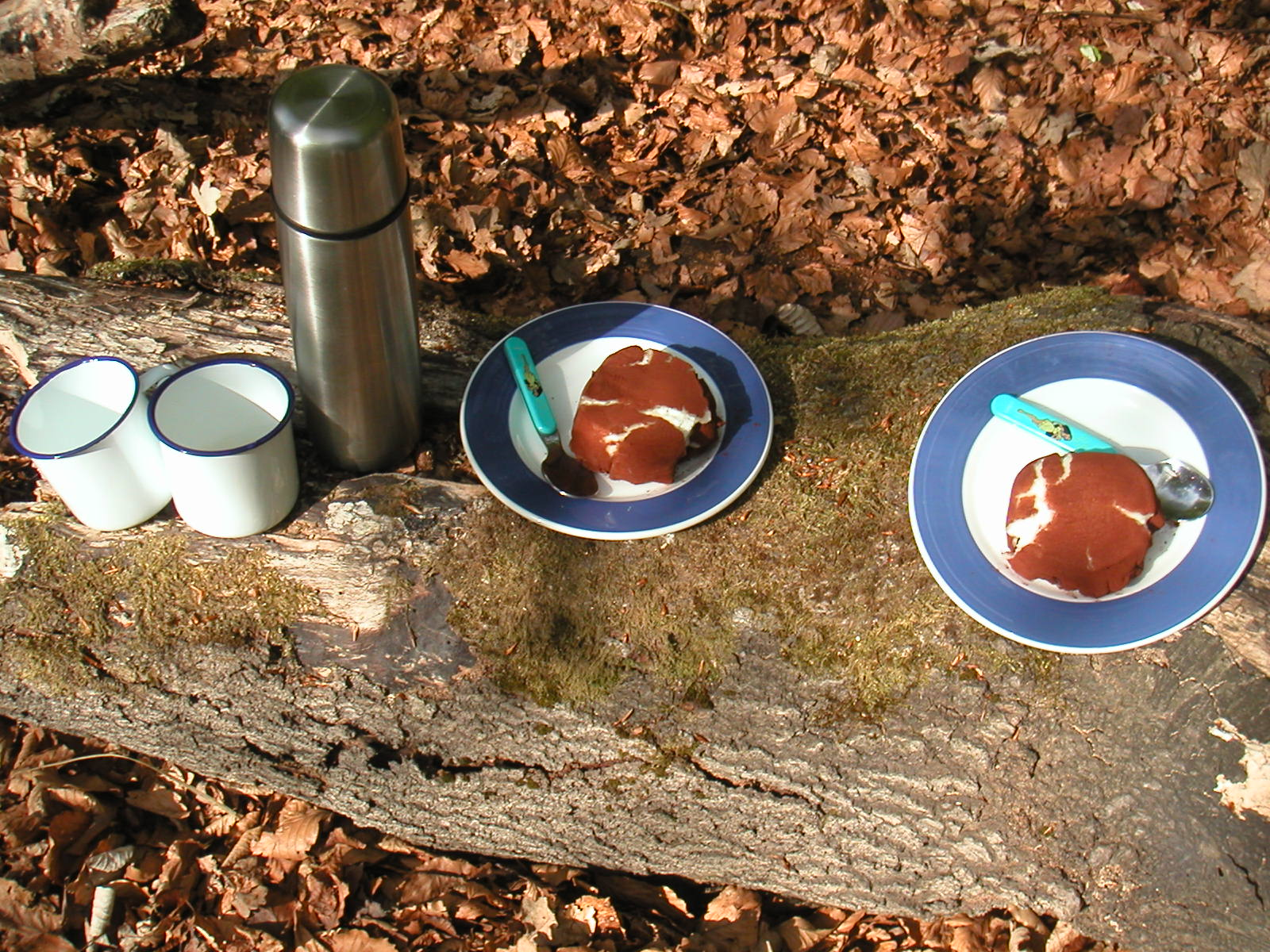 Kaffe og kartoffelkage